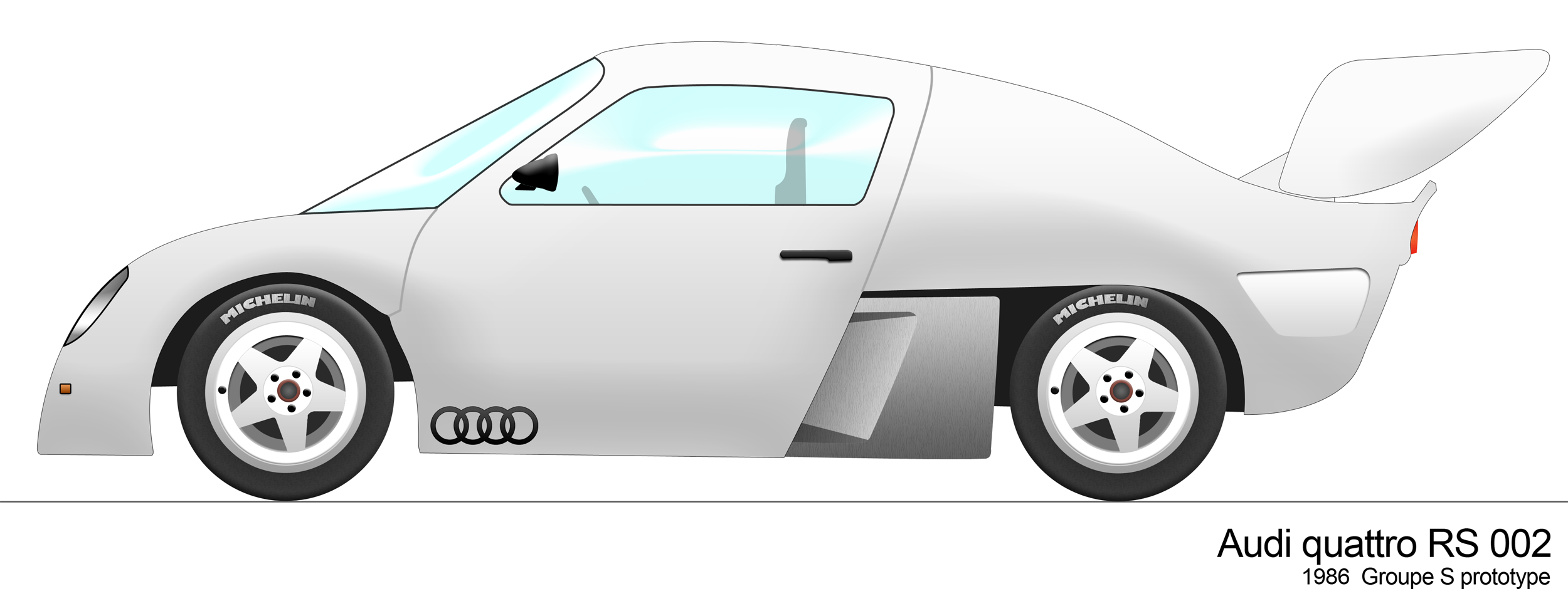 Le prototype Audi quattro RS 002 groupe S